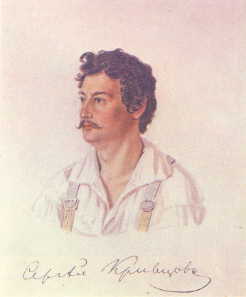 Портрет Сергея Ивановича Кривцова работы Николая Александровича Бестужева. 1828 год